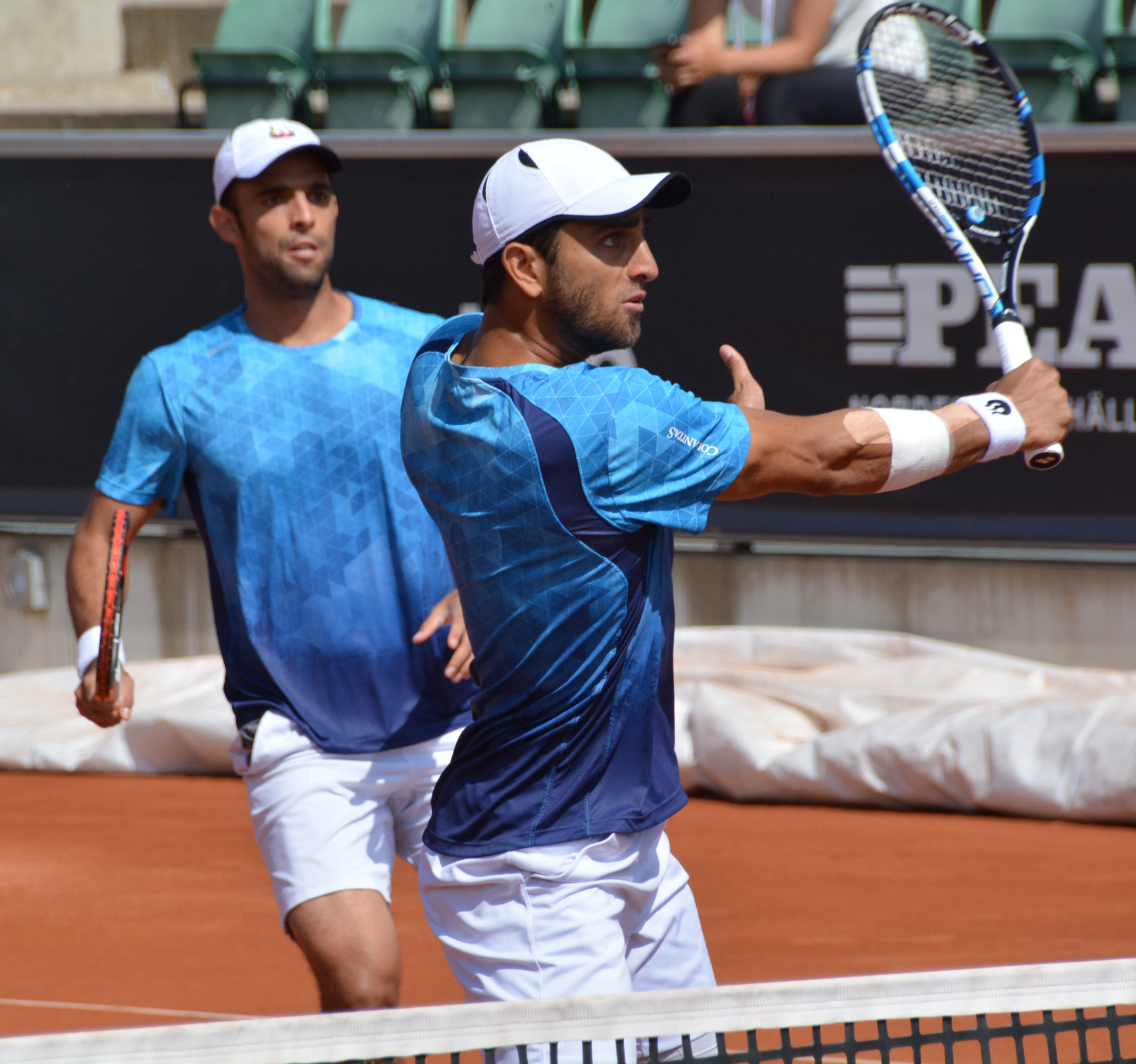 ATP Båstad 2015